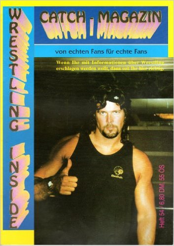 Catch-Magazin